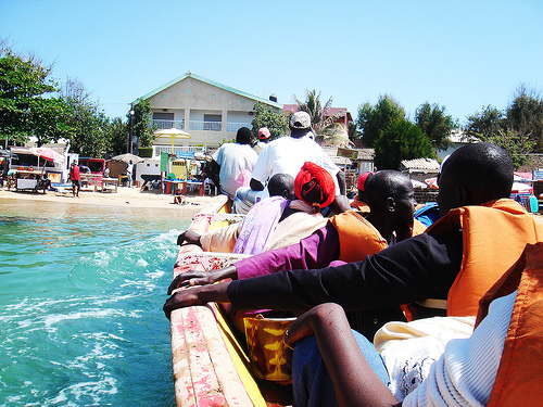 Ngor, village (Senegal)